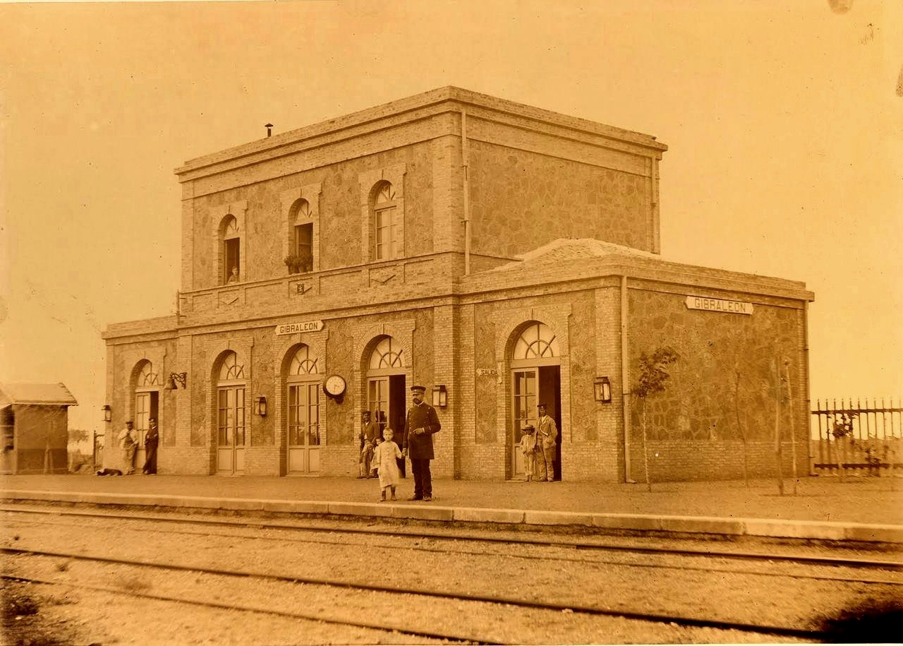 ANTIGUA ESTACION DE GIBRALEON FOTOGRAFIADA EN 1889 POR BALDOMERO SANTAMARIA